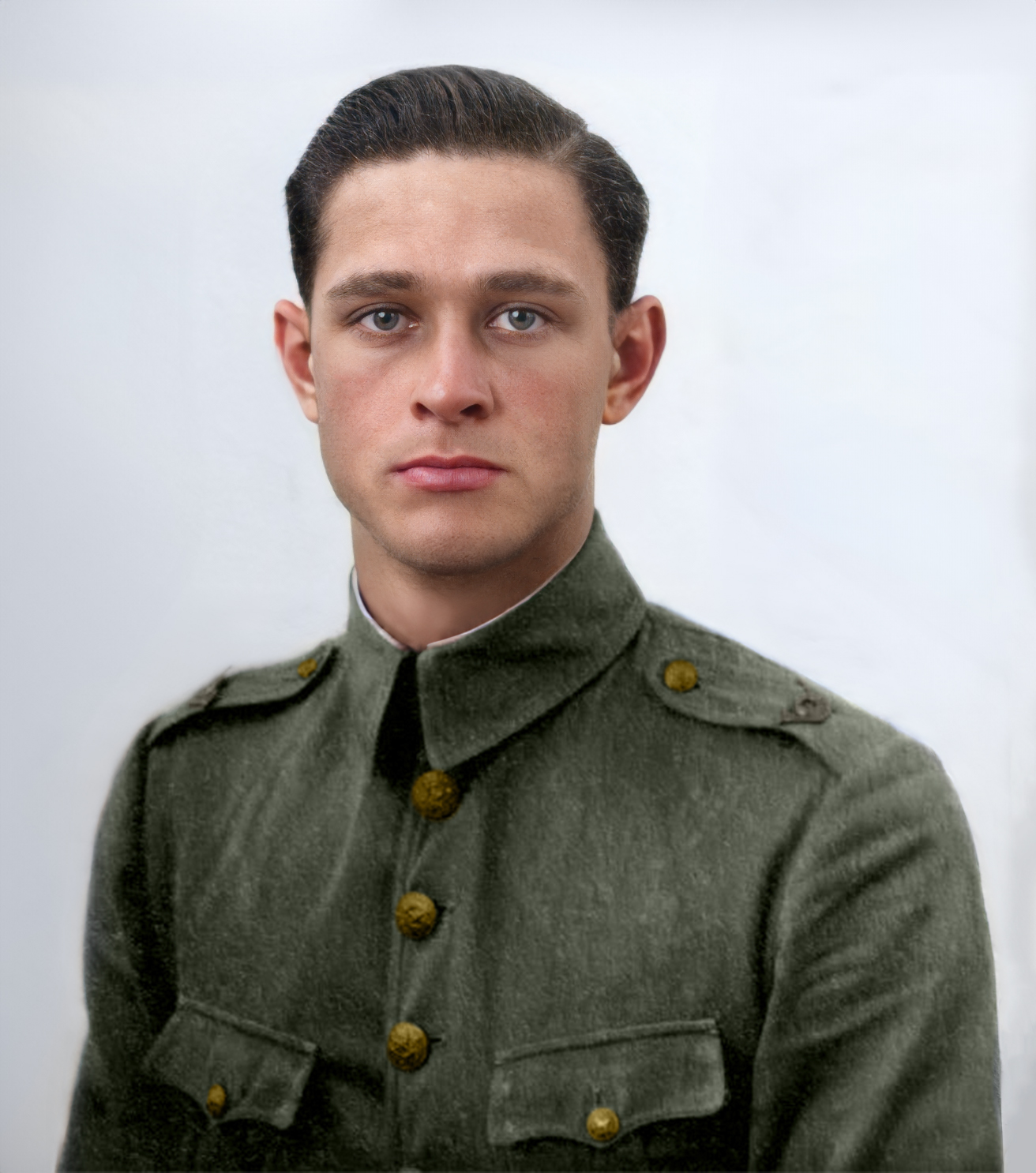 Albert Eduard Stoové aan het begin van zijn militaire opleiding in 1939. Foto genomen door het leger. Collectie, militaire luchtvaart KNIL Fotoarchief, objectnummer: 0807-069-120-001